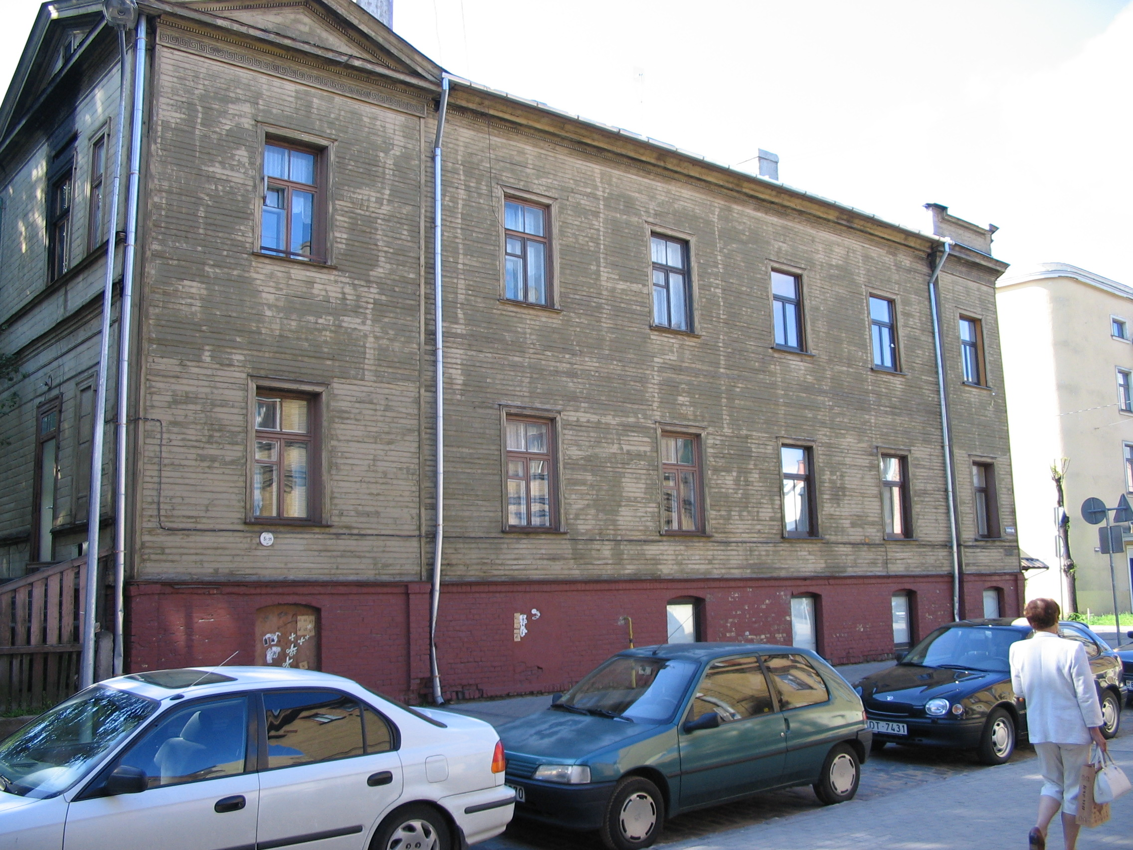 eigen foto - houten huis in Riga